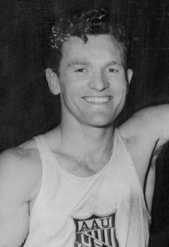 1951 Evening Star Games Pole Vault Robert Richards and Don Laz Press Photo